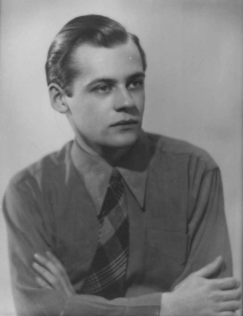 Pierre Mercure - 06M MSS60P002-Portrait-787x1024